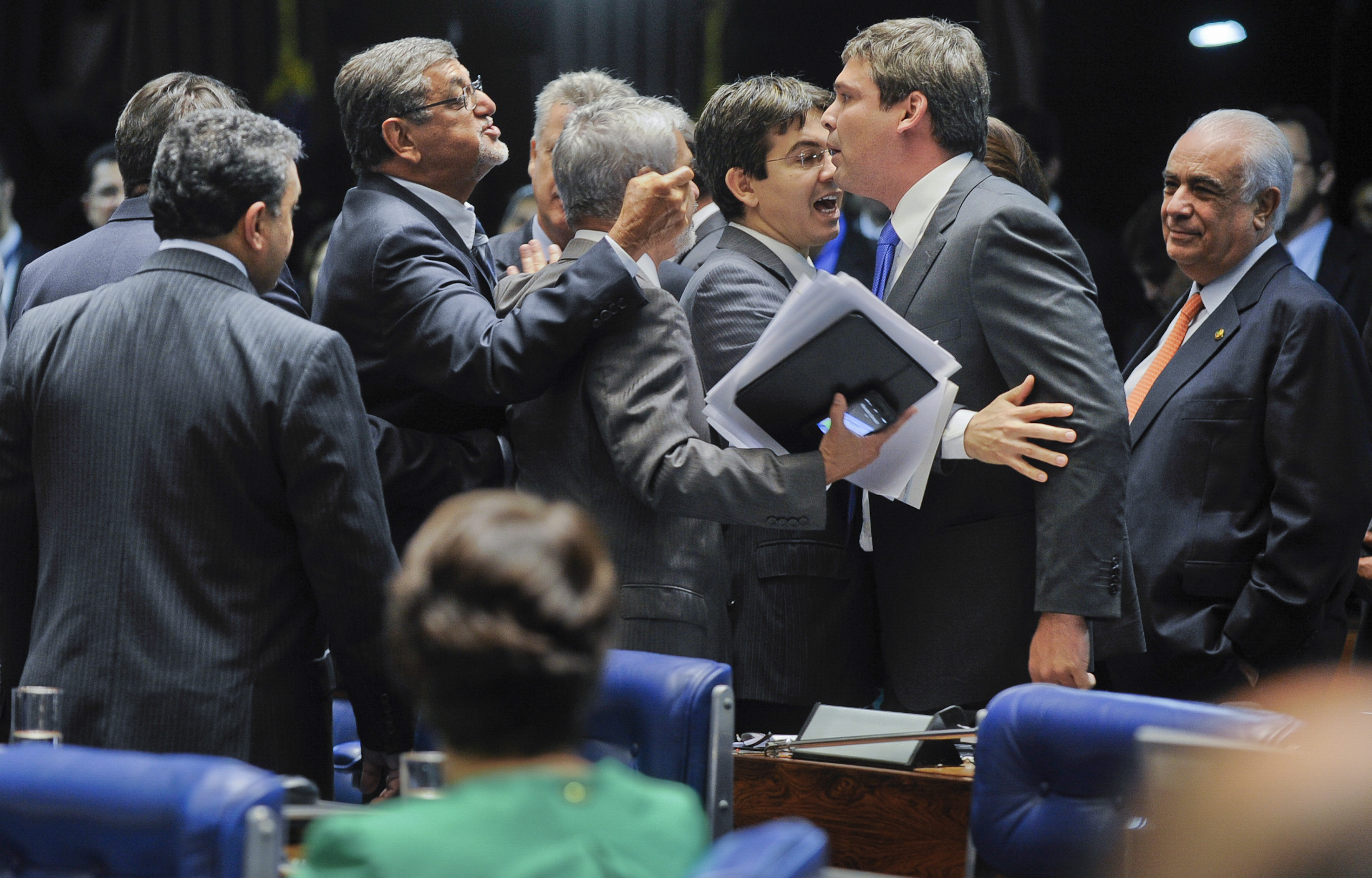 Discussão em Plenário sobre o regime de urgência para votação do Marco Civil da Internet acirrou os ânimos entre os senadores Mário Couto e Lindbergh Farias. Foto: Moreira Mariz/Agência Senado